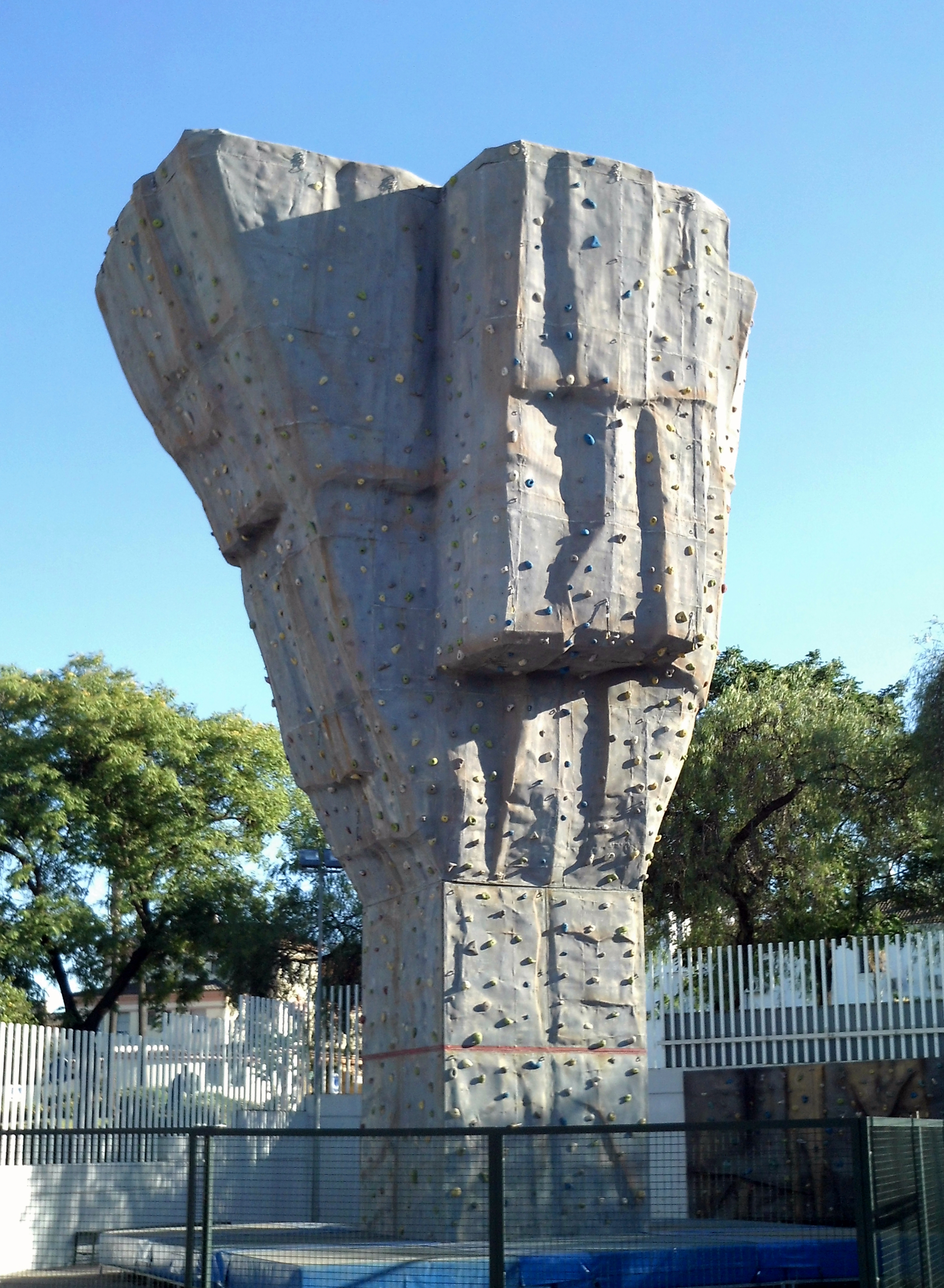 Rocódromo. Polideportivo de Mascareta. Tomares, provincia de Sevilla, Andalucía, España.